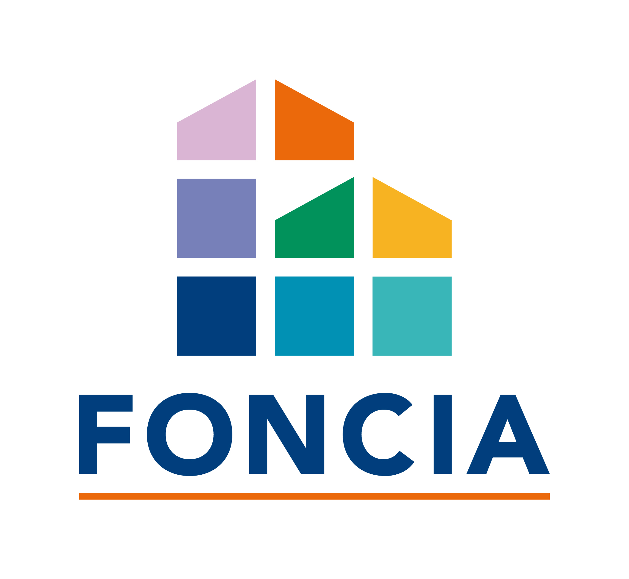 Logo Foncia 2019